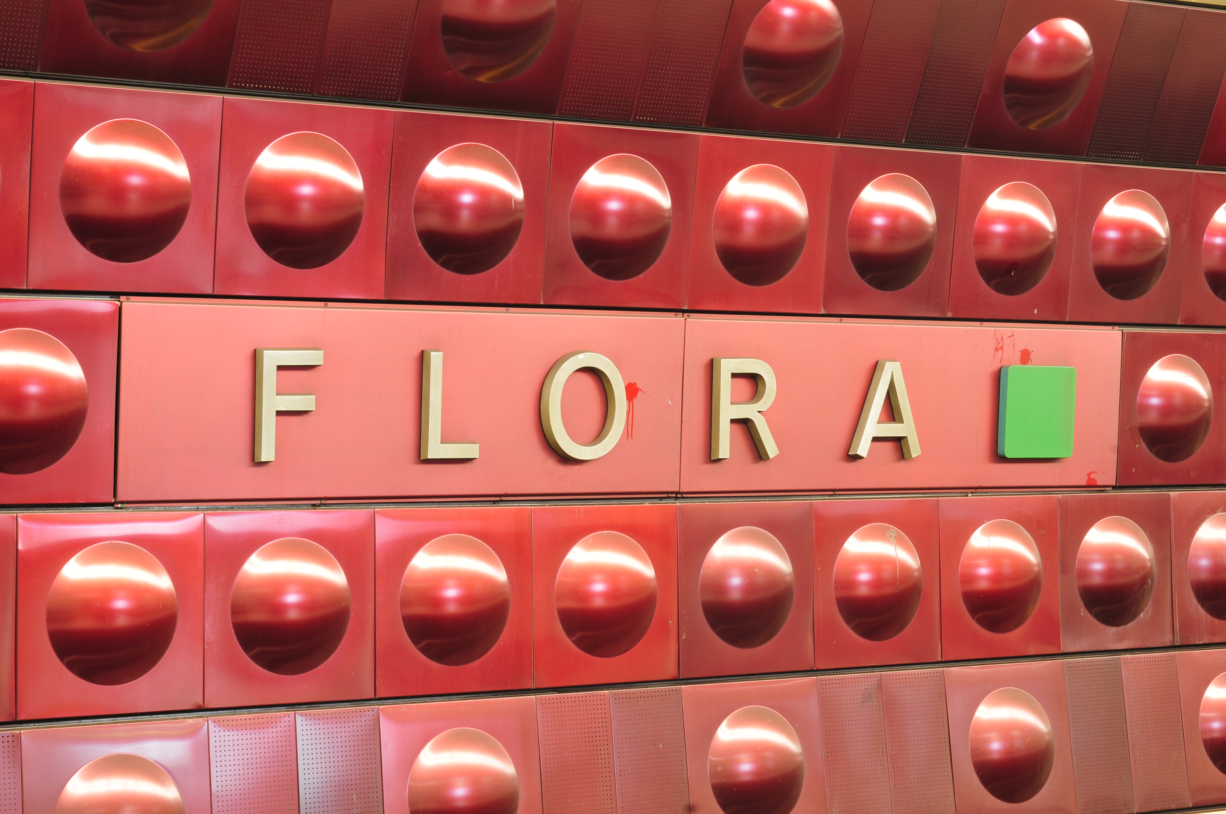 Metro Praha